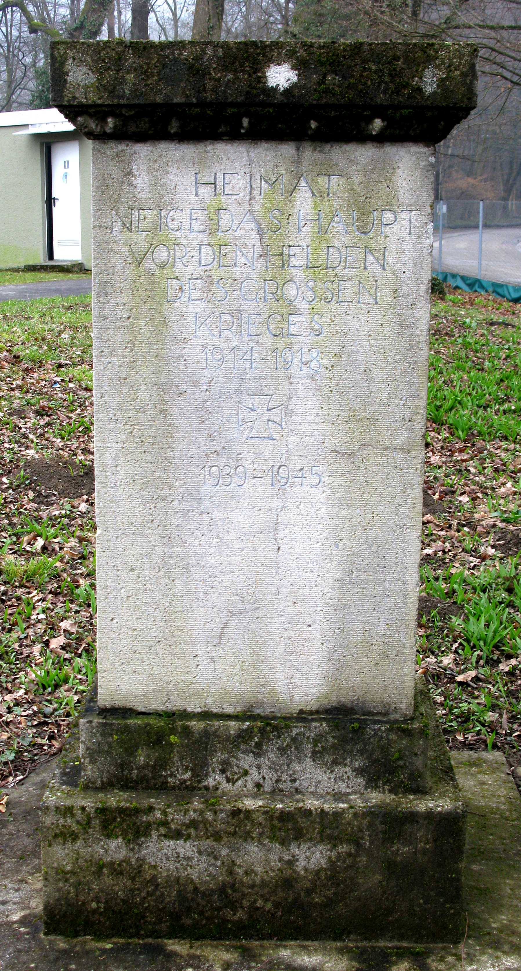 Gedenkstein des Freiburger FC beim Möslestadion